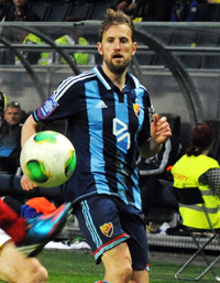 Djurgårdens IF Player Peter Nymann.